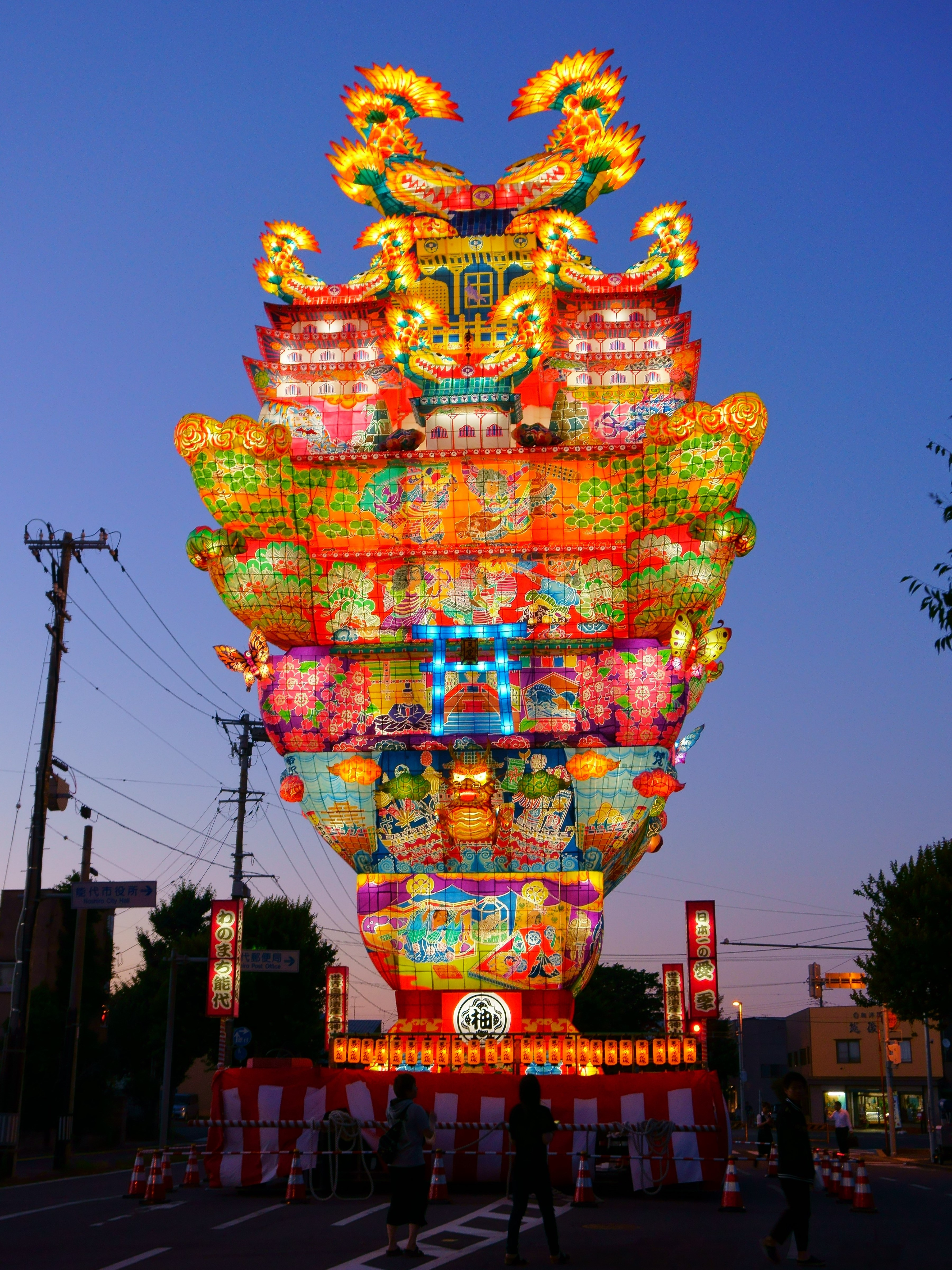 能代七夕「天空の不夜城」。高さ24.1mを誇る日本一の七夕燈籠「愛季」（ちかすえ）である。撮影日は天空の不夜城運行日ではなくその前日のこども七夕の日に撮影したもの。能代市役所西側の国道101号にて撮影。